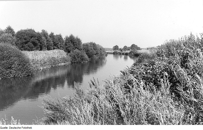 Original image description from the Deutsche Fotothek Krauschwitz-Pechern. Neißepartie auf Werdeck zu